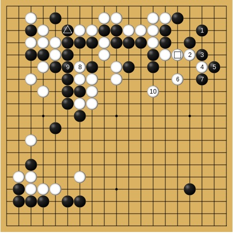 1958年8月10-11日 第13期本因坊戦挑戦手合七番勝負第4局 高川秀格(先番)-杉内雅男 75-84手目